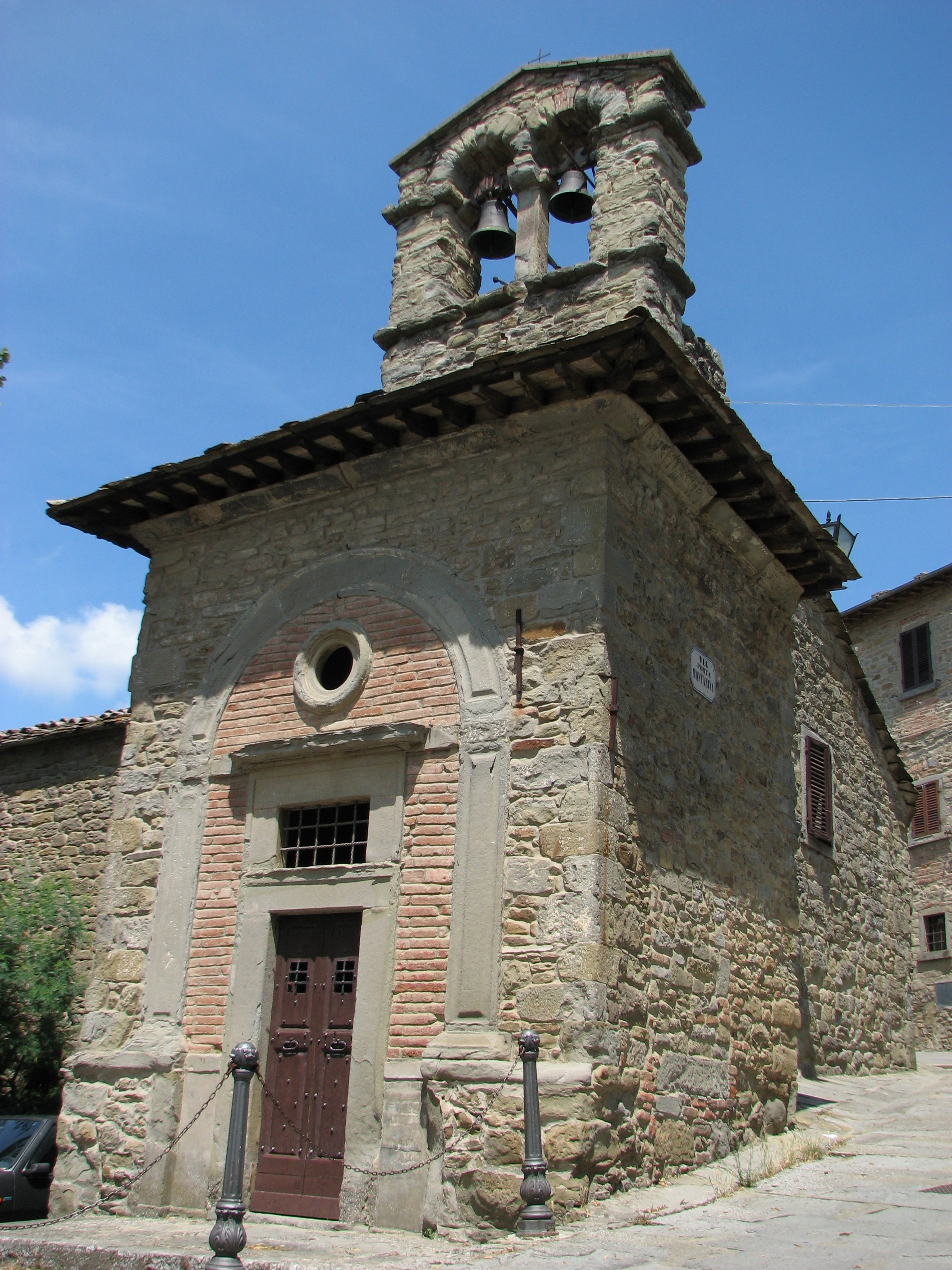 Cortona, Toscana, Italia